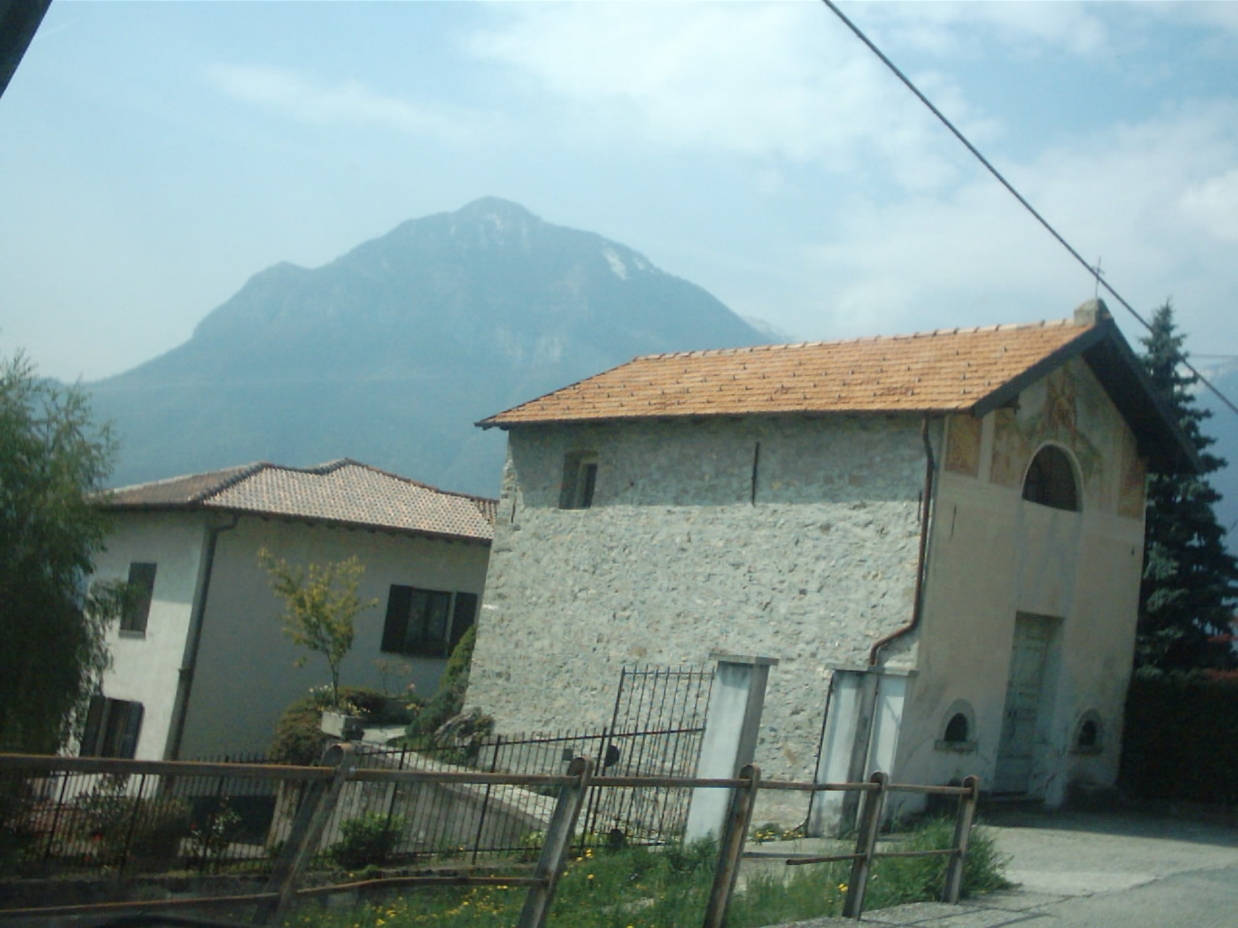 Cappella di San Rocco,nell'omonima frazione di Plesio(CO)